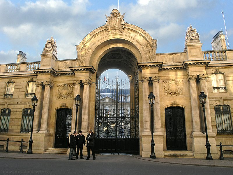 Palais de L'Elysée (ENG:Elysée Palace)